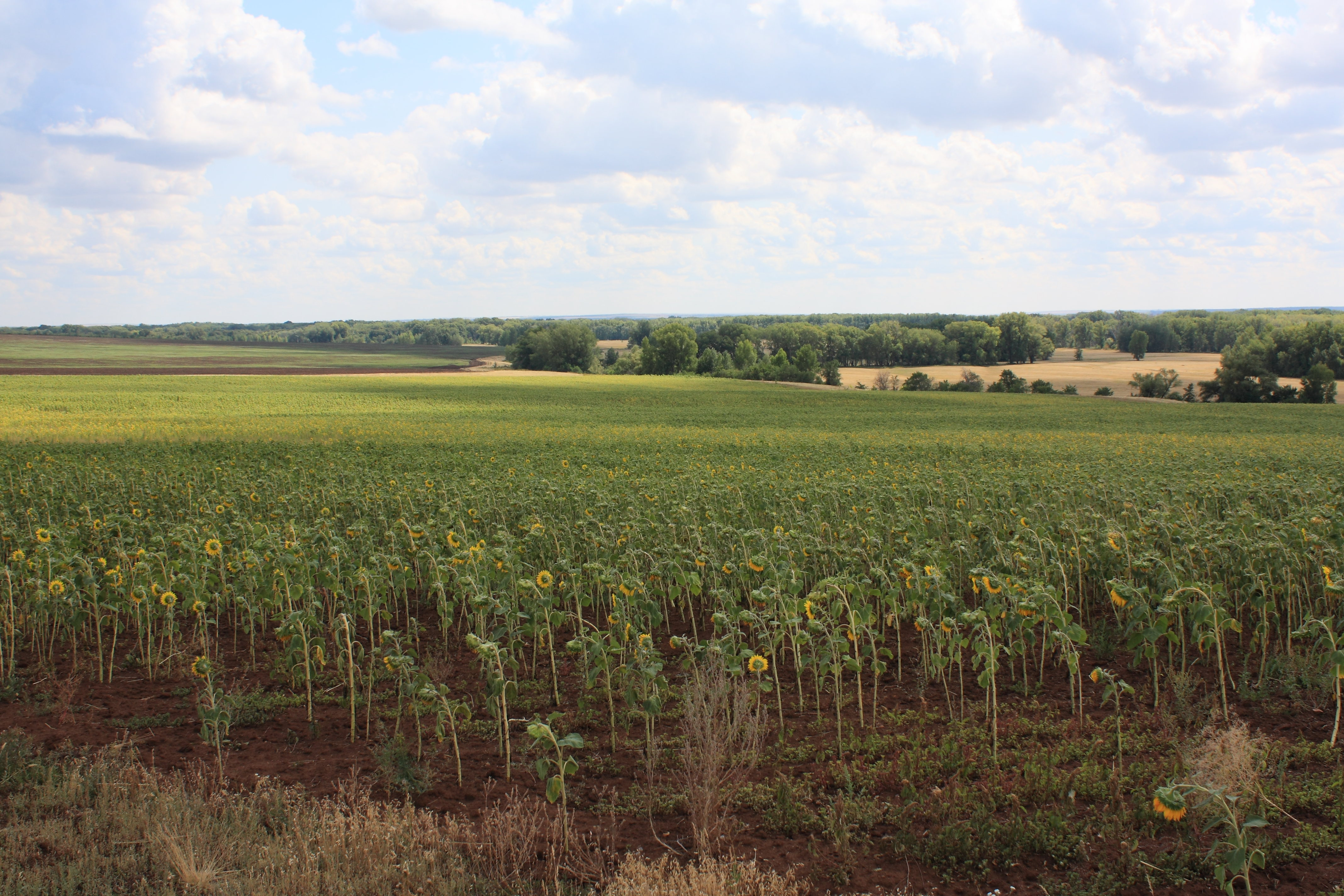 Восточнее Каменки